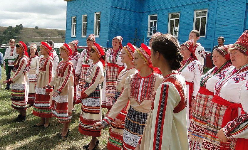 Бишбүләк районы Каменка ауылы ансамбле "Эрзә"